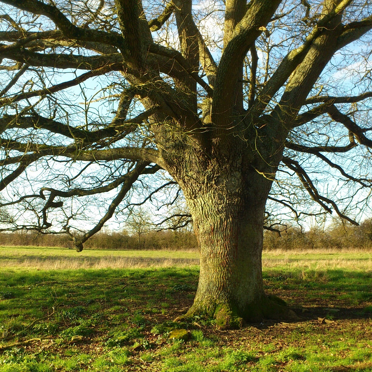 Chêne bicentenaire - Chenay, Deux-Sèvres (79), France - Février 2013.